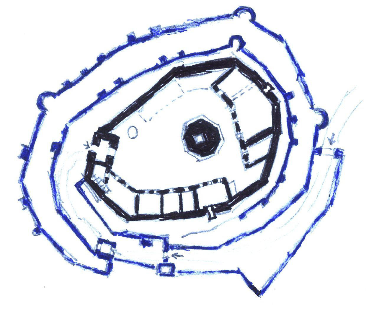 Burg Steinsberg, Grundriss (gezeichnet nach Walter Hotz, Pfalzen und Burgen der Stauferzeit)